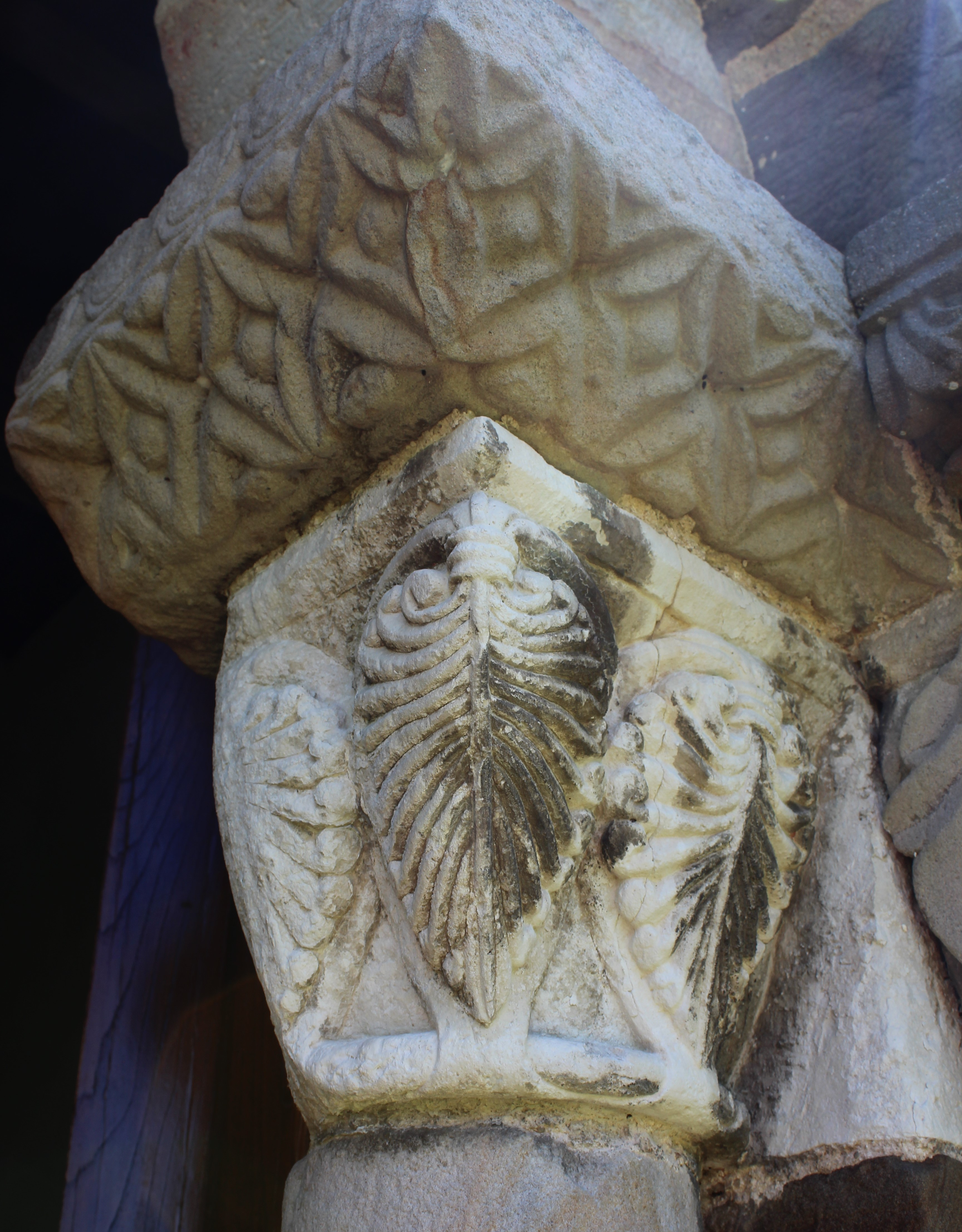 Capitel del pórtico principal, zona derecha interior